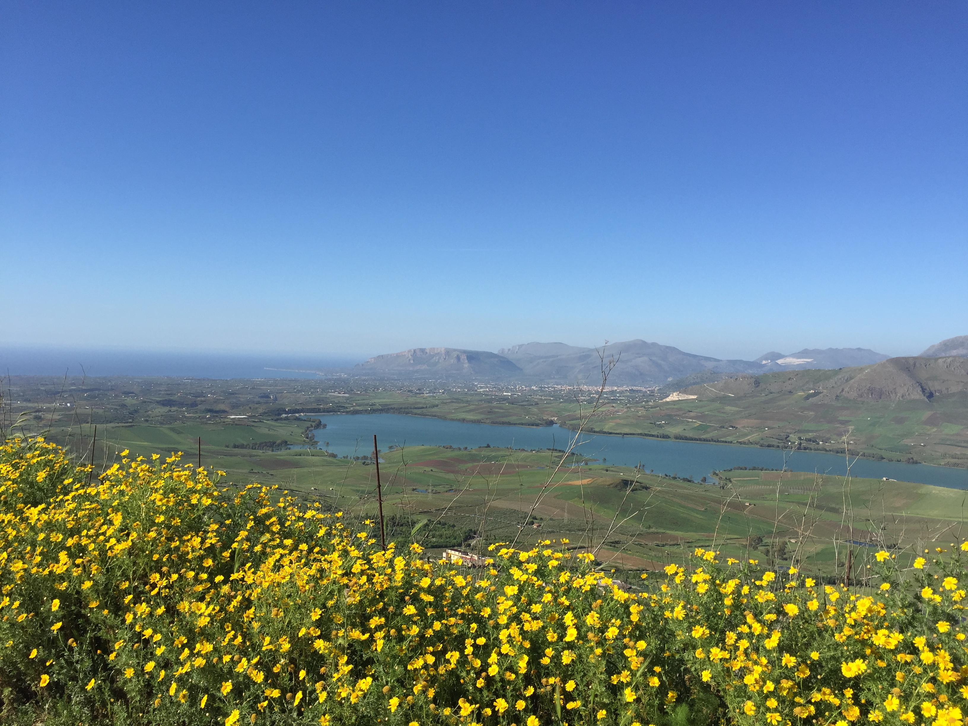 La valle dello Jato e la diga, Grisì (PA)